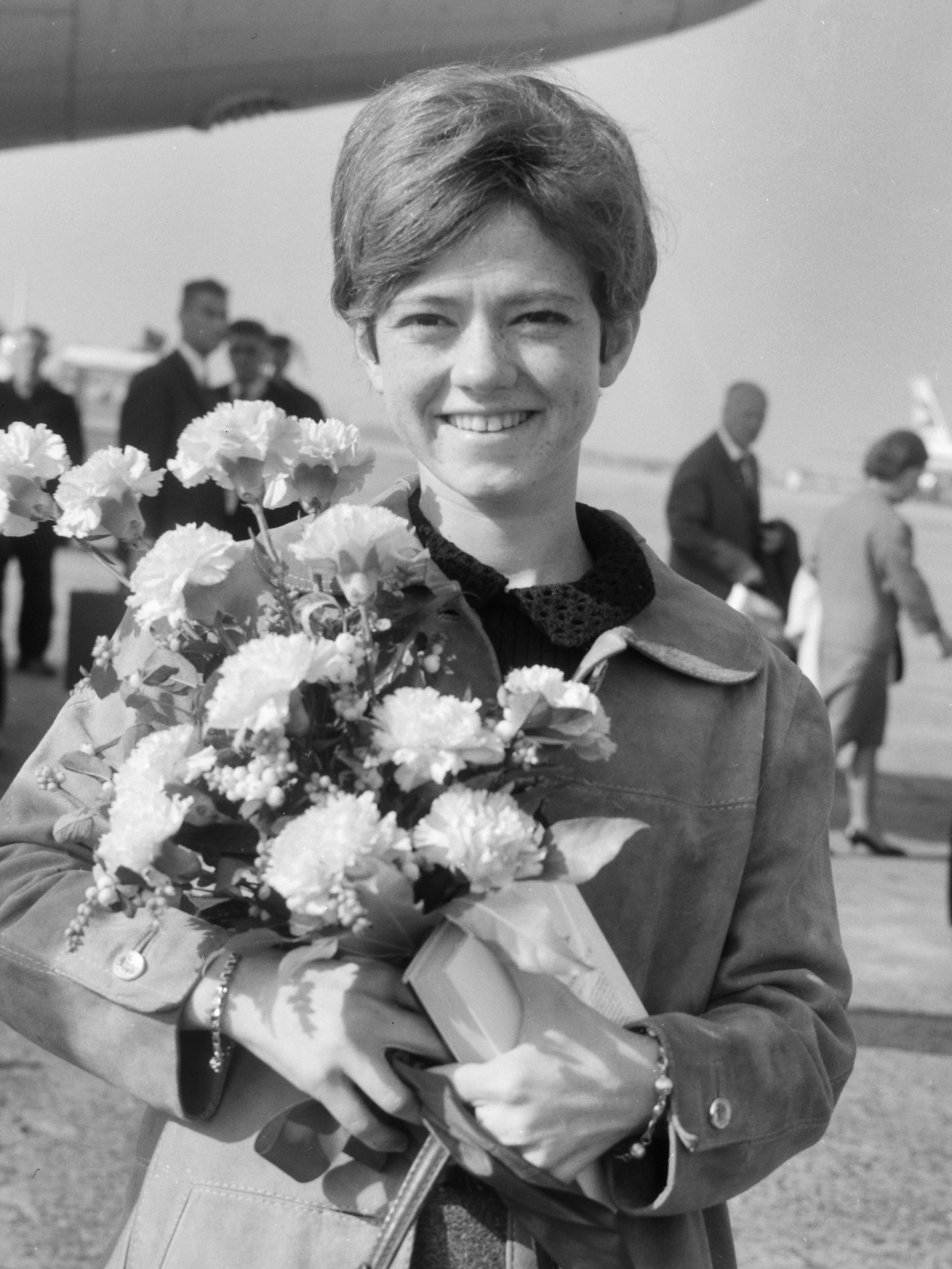 Aankomst Rita Pavone (zangeres), Grand Gala du Disque